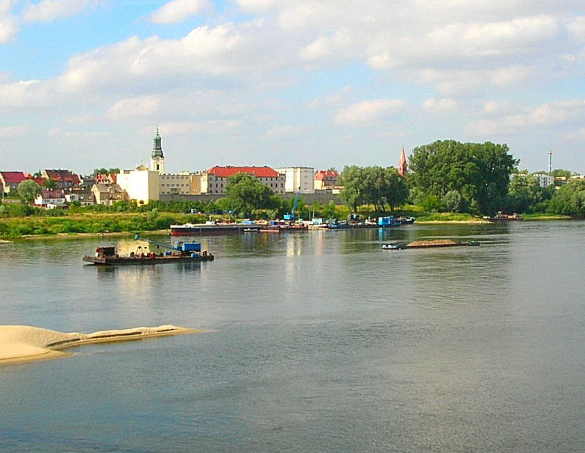 Kościoły w panoramie nadwiślańskiej Fordonu